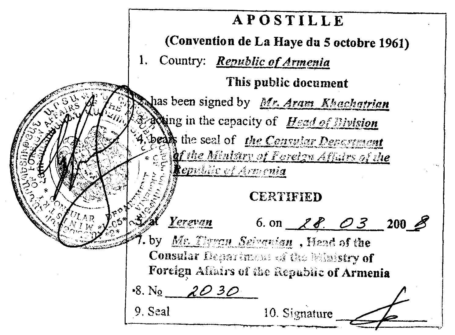 Апостиль (Армения)